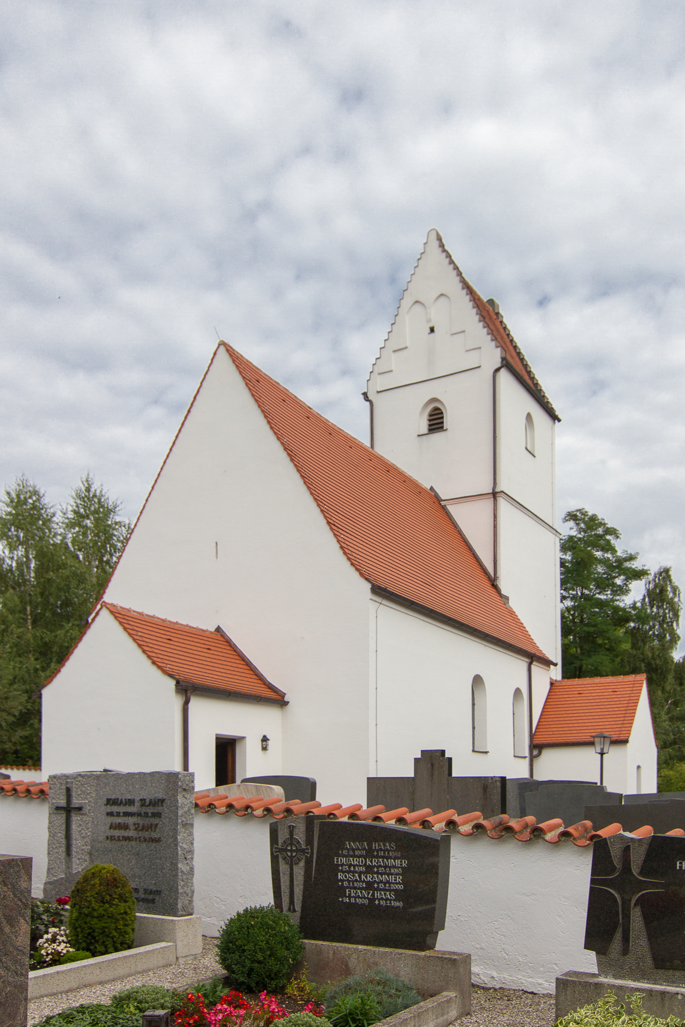 Kath. Filialkirche St. Johannes d. T. 15. Jahrhundert, 1884 überarbeitet; mit Ausstattung.This is a photograph of an architectural monument.